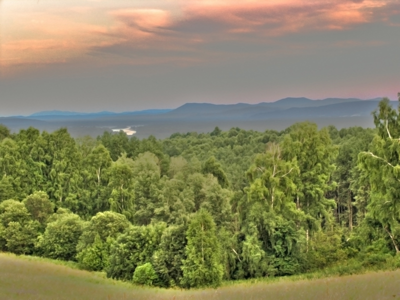 Первый вид на Алтай по пути из Бийска